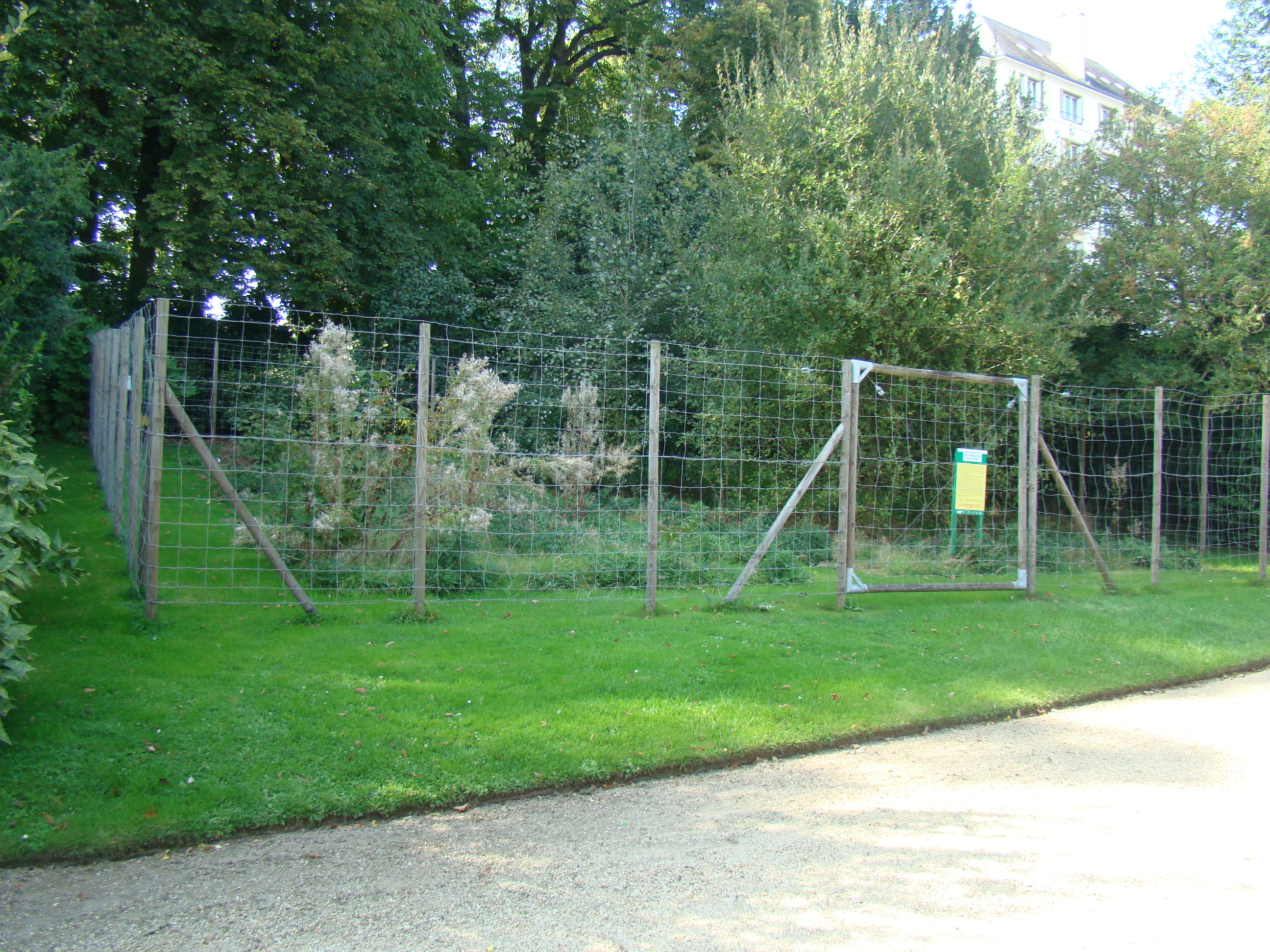 Terrain cloturé pour l'étude de l'INRA ECORURB sur la colonisation des espèces en milieu urbain, dans la roseraie du parc du Thabor.